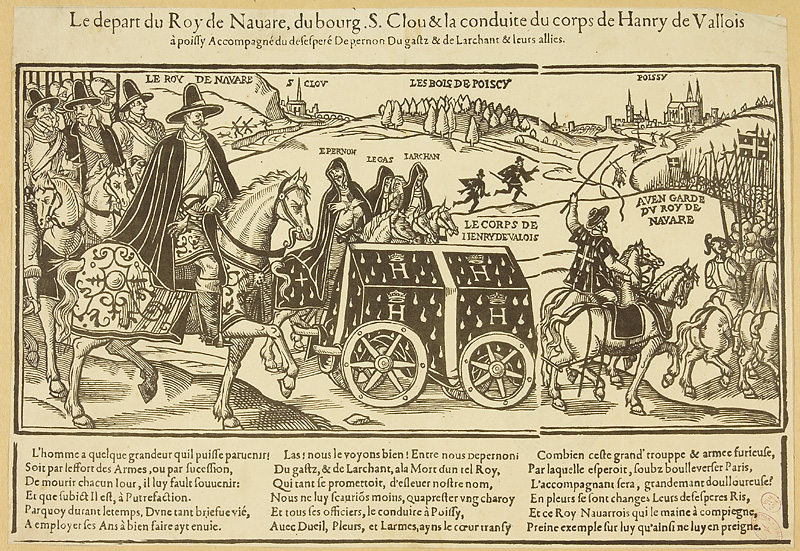 Henri IV (« le roy de Navare ») amène la dépouille de son cousin et beau-frère le roi Henri III (« Henry de Valois ») à Poissy. Gravure de propagande diffusée par les Ligueurs, où l'on voit Epernon, Le Gast et Larchant, anciens compagnons d'Henri III, travestis en pleureuses pour les déconsidérer. Voir N. Le Roux, Le roi, la cour, l'Etat de la Renaissance à l'absolutisme, Champ Vallon, Seyssel, 2013, p.259.